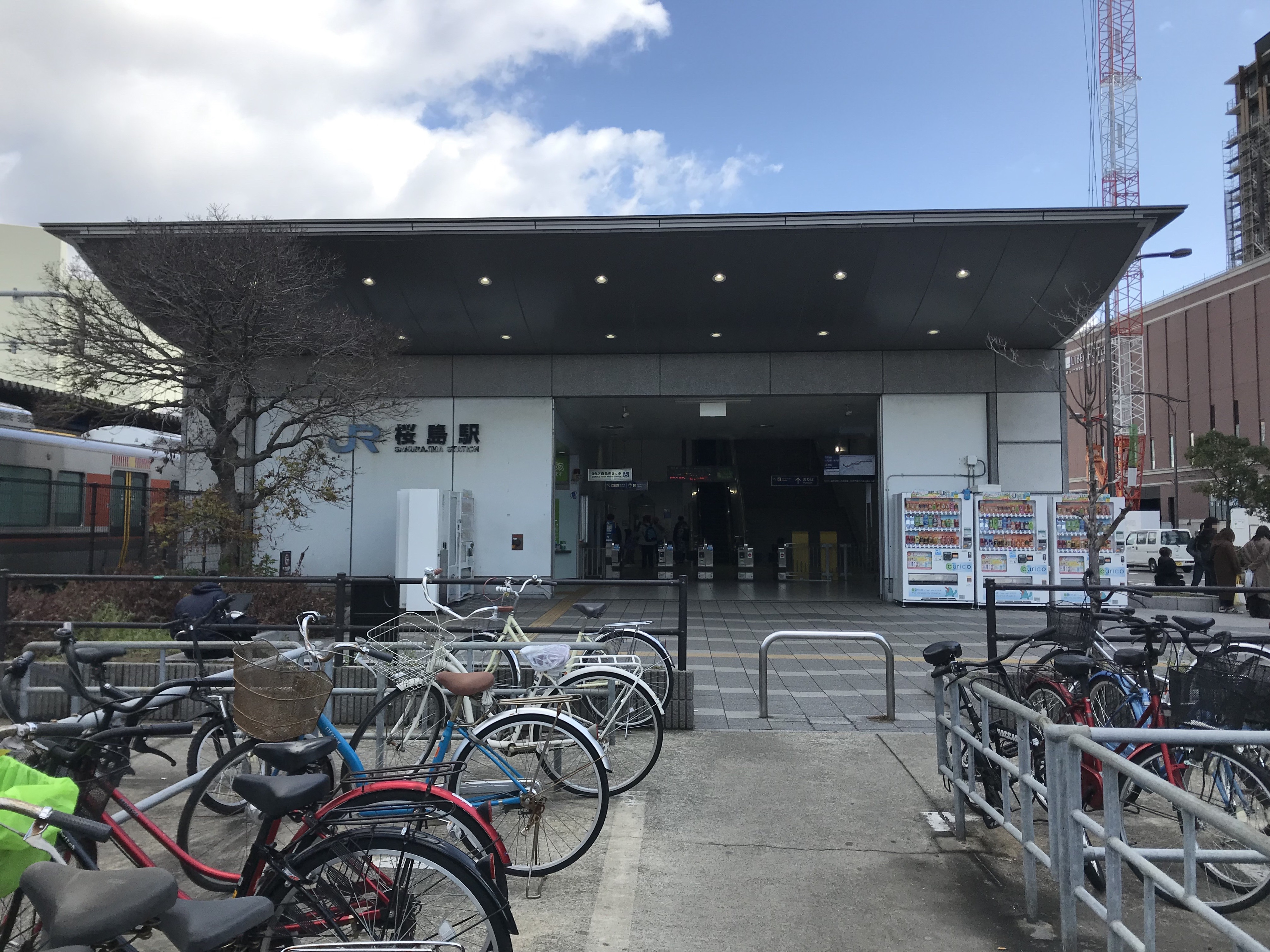 桜島駅の駅舎